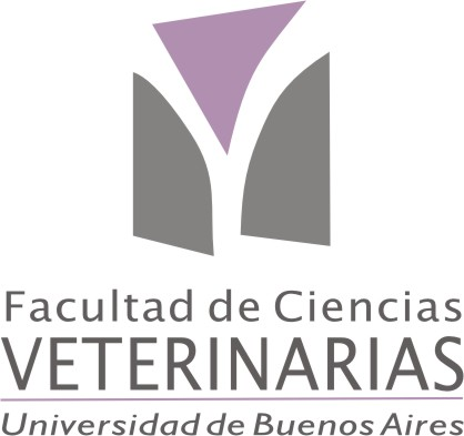 Universidad de Buenos Aires